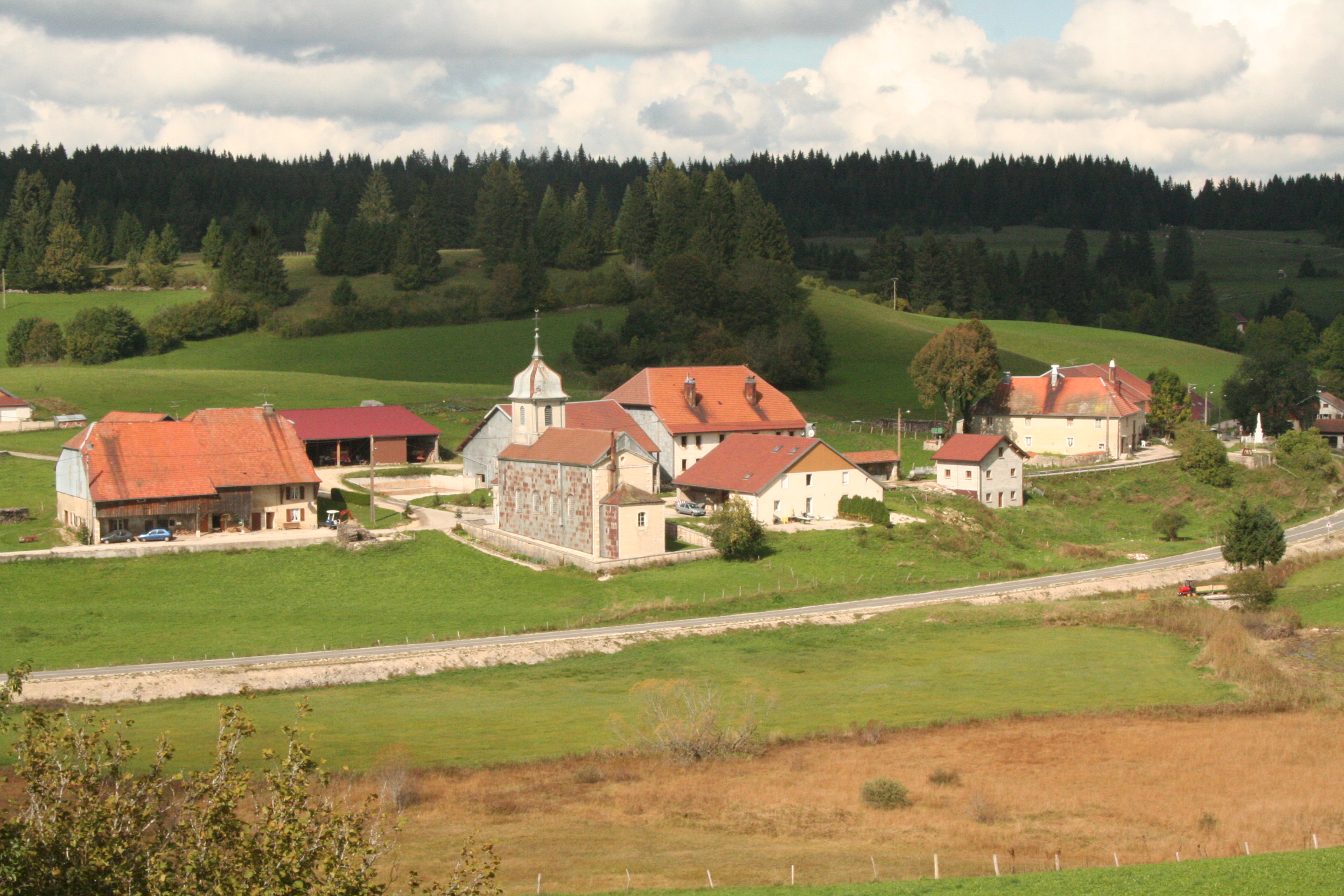 Vue du village du Brey